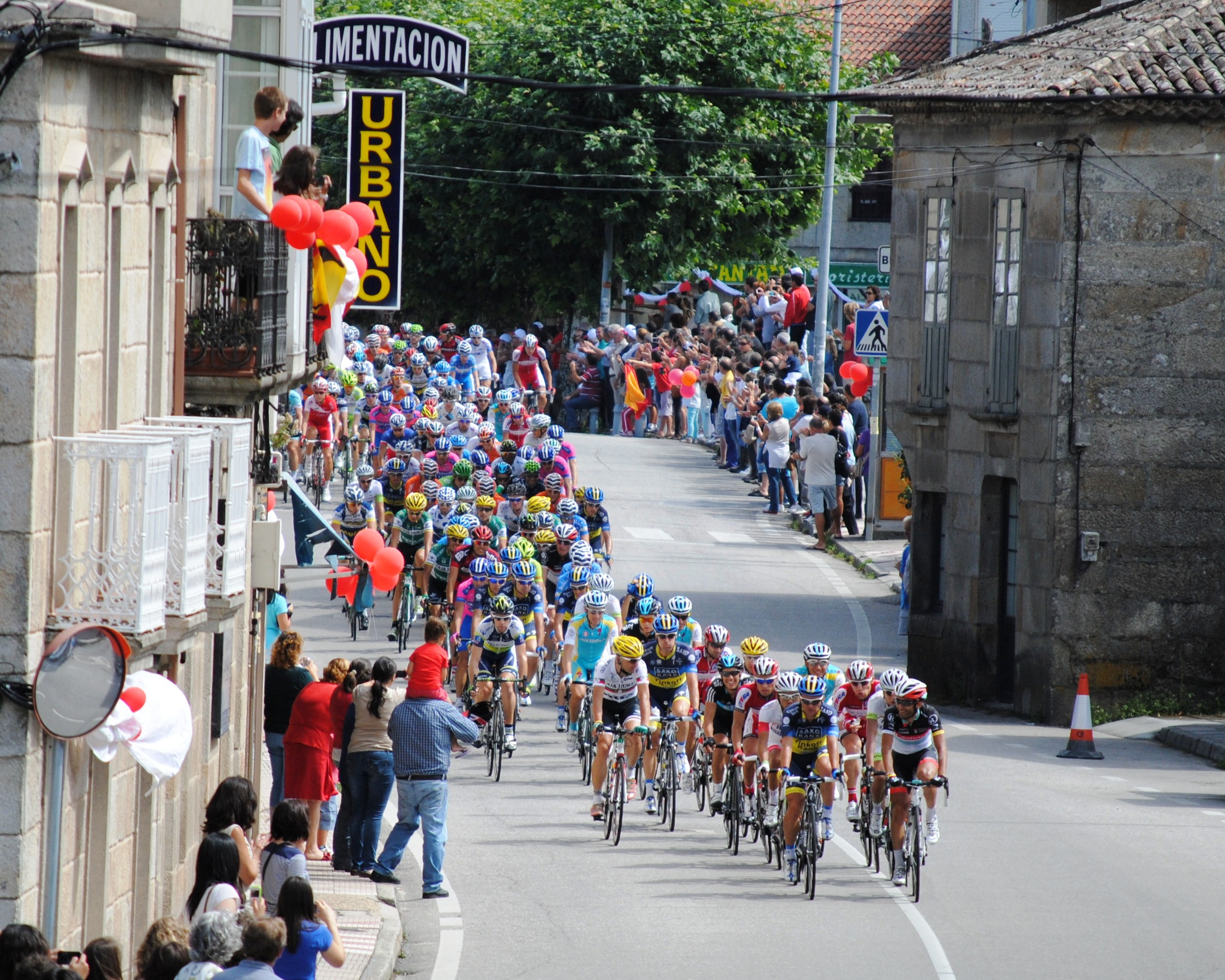 Baiona, Vuelta a España 2012